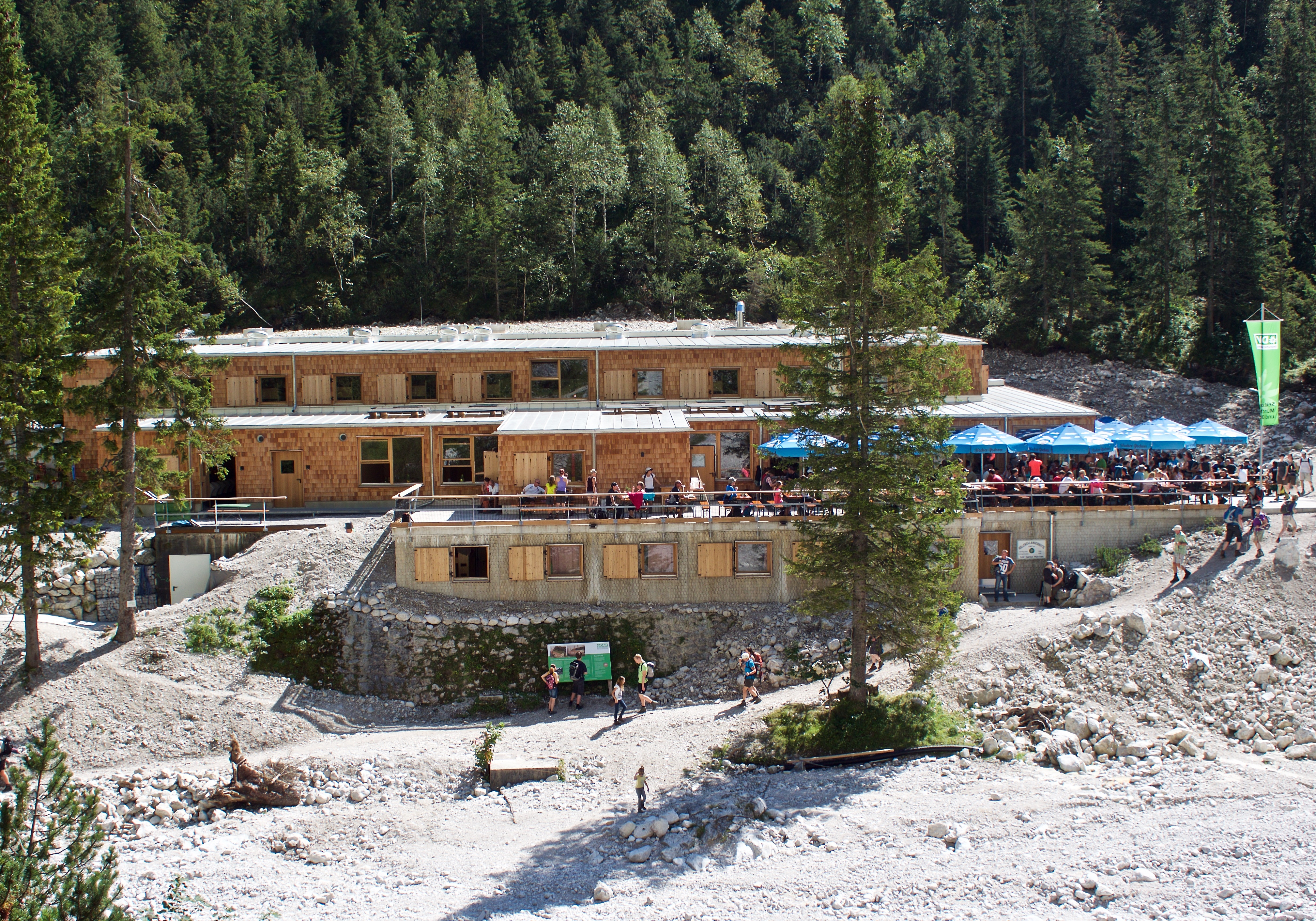 Neubau der Höllentalangerhütte im Jahr 2015 auf 1387 m Höhe durch die DAV Sektion München & Oberland bei Hammersbach/Garmisch-Partenkirchen